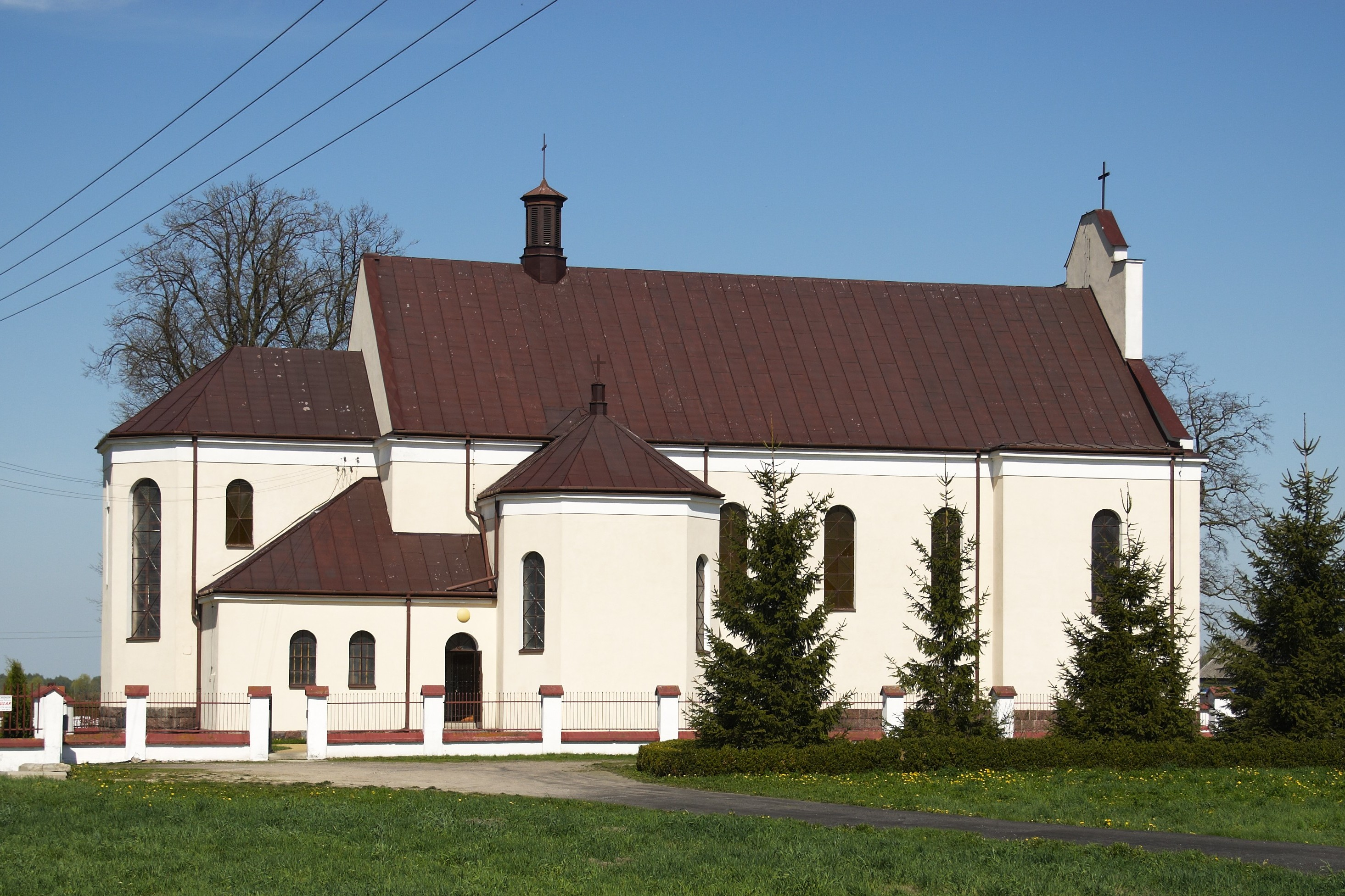 Kościół św. Wawrzyńca w Rogotwórsku.